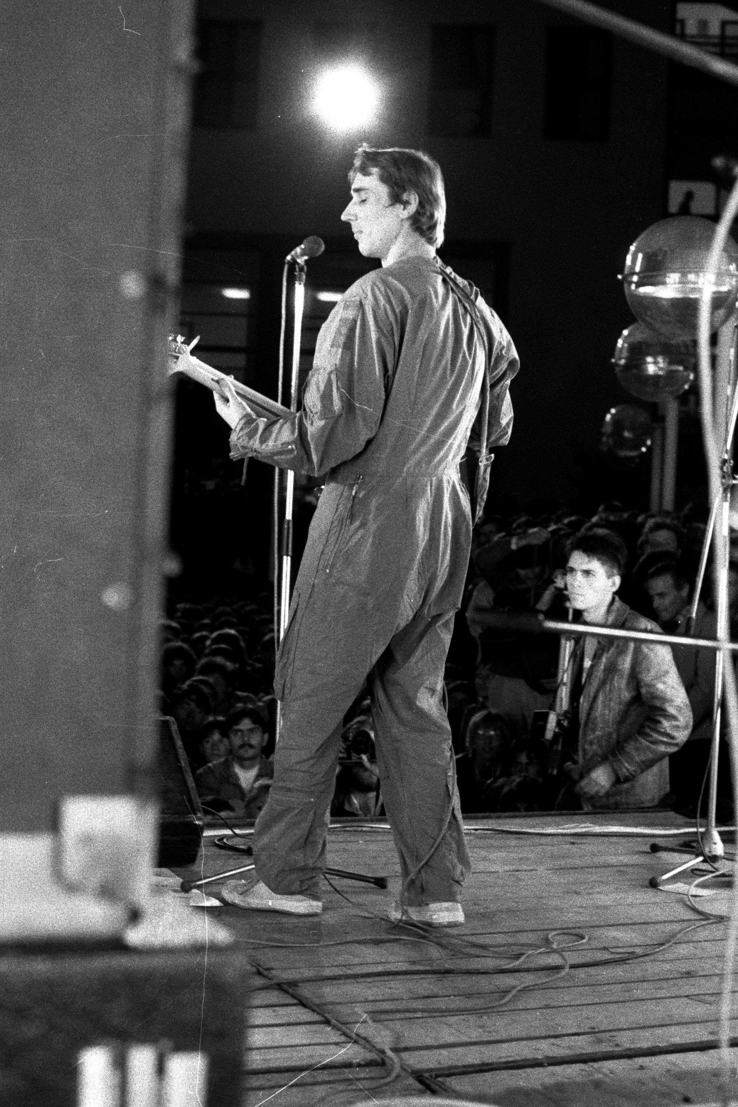 a Marx Károly Közgazdaságtudományi Egyetem Kinizsi utcai épületének (ma Református Gimnázium és Kollégium) udvara. Az URH együttes búcsúkoncertje 1985. szeptember 13-án, Menyhárt Jenő basszusgitáros, énekes. Location: Hungary, Budapest IX. Tags: Budapest Title: a Marx Károly Közgazdaságtudományi Egyetem Kinizsi utcai épületének (ma Református Gimnázium és Kollégium) udvara. Az URH együttes búcsúkoncertje 1985. szeptember 13-án, Menyhárt Jenő basszusgitáros, énekes.